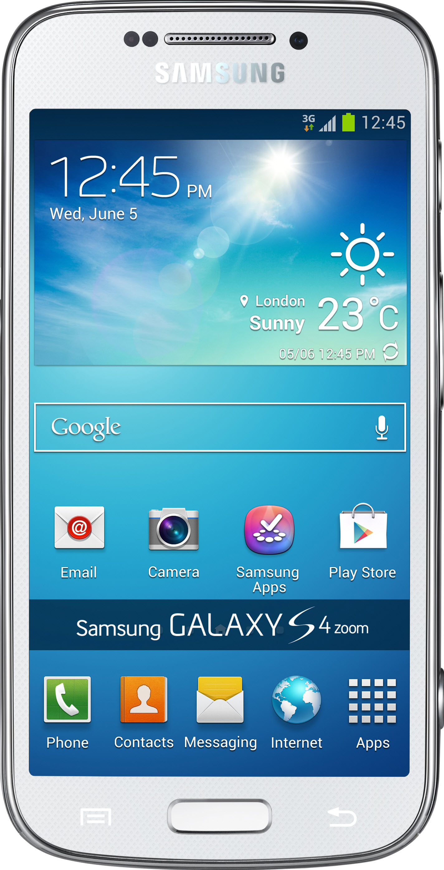 Galaxy S4 Zoom